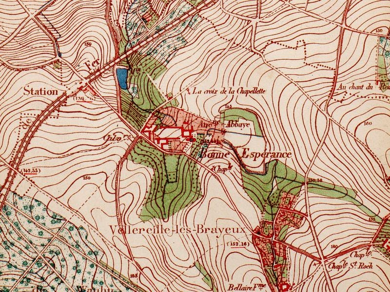 Détail d'une carte topographique (1882) indiquant l'abbaye de Bonne-Espérance et la ligne ferroviaire 108 (Vellereille-les-Brayeux, Belgique).